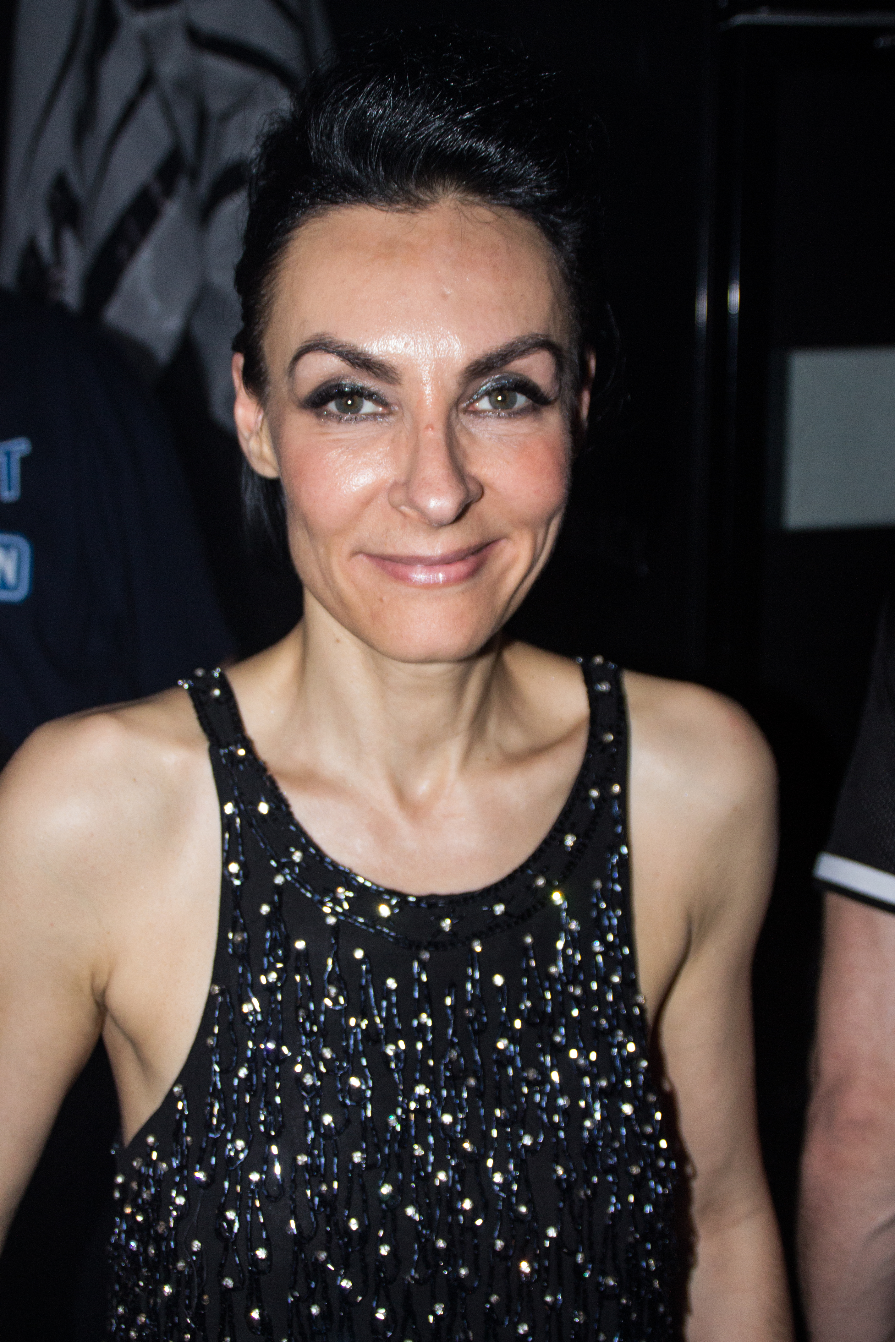 Marusha bei einem Live-DJ-Set auf dem Berlin Summer Rave 2015 am 13./14.06.2015 auf dem Ehemaligen Flughafen Tempelhof